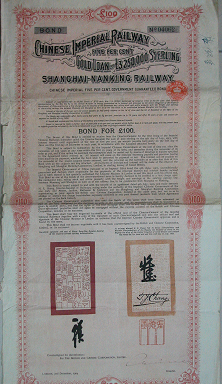 这是1904年发行的沪宁铁路债券，债券上印有详细的债券发行条款，其中多数条款是倾向英国的利益